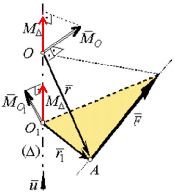 Momentul unei forţe în raport cu o axă